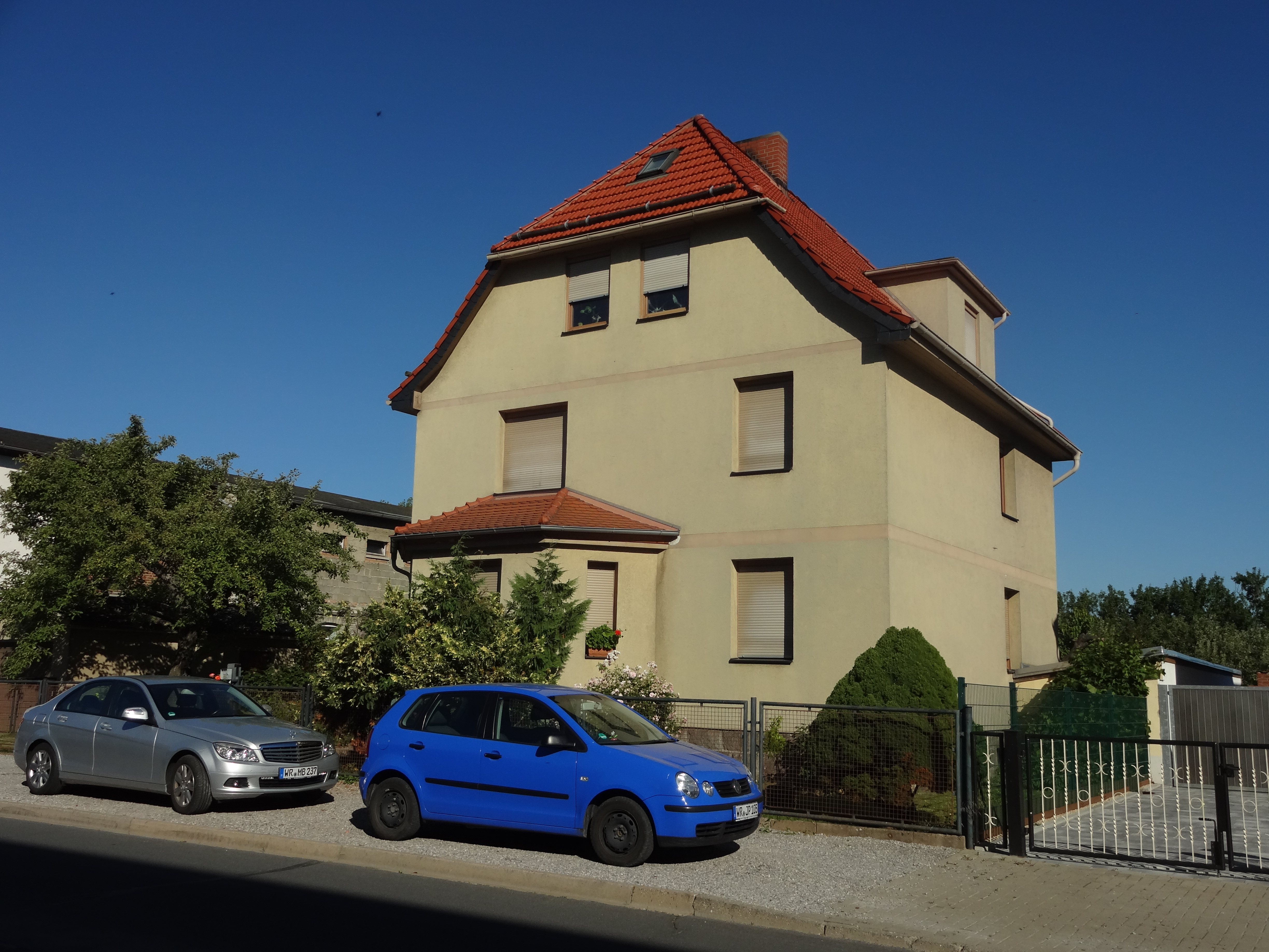 ehemals denkmalgeschütztes Wohnhaus in Große Dammstraße 67 in Wernigerode